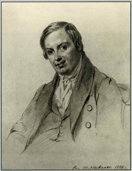 Andrej Ivanovich Lizogub, in un ritratto a matita del 1846, opera di Taras Scevchenko